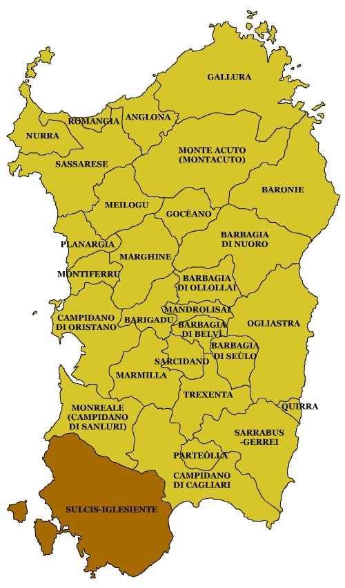 Sardinian Subregions